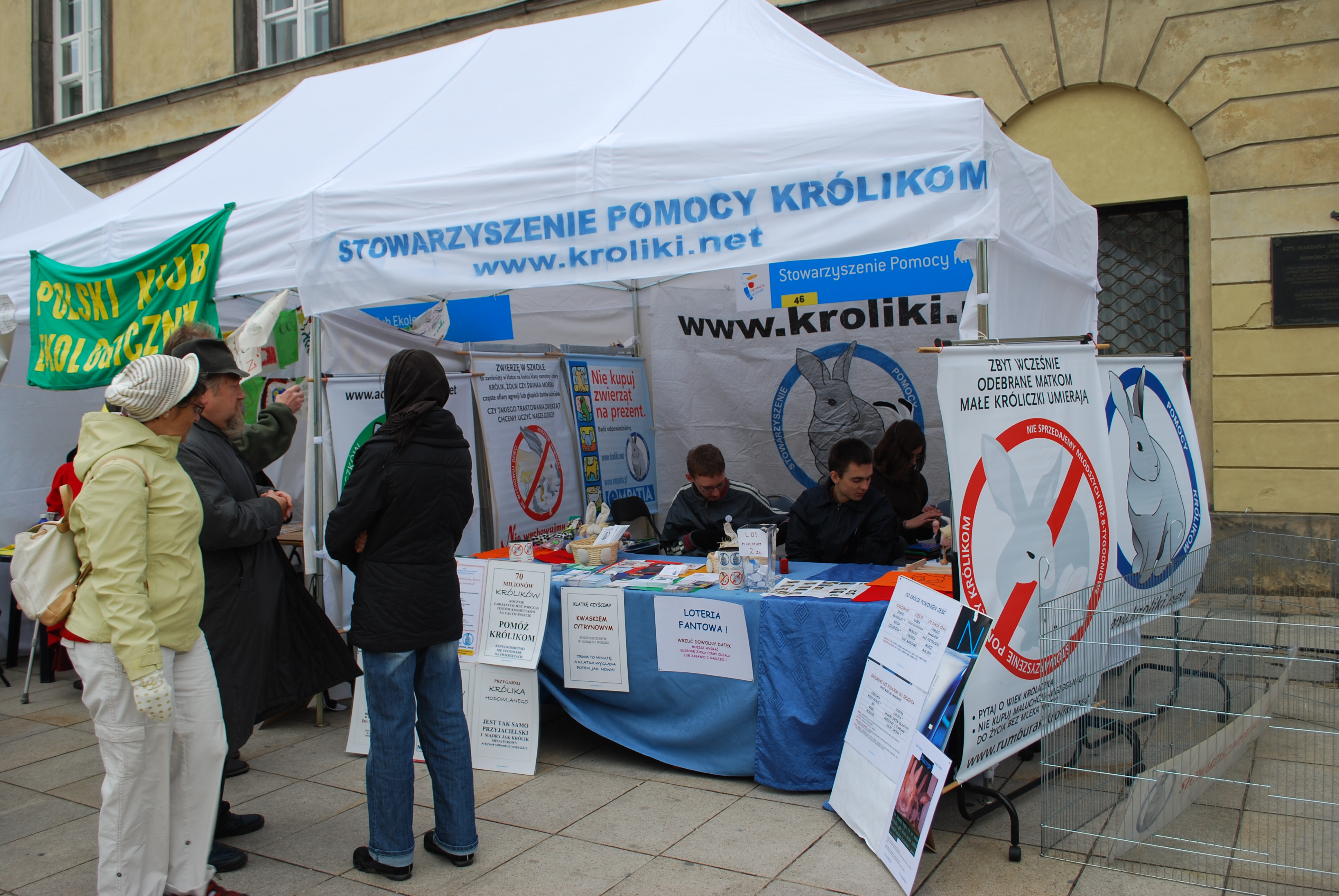 Stanowisko Stowarzyszenia Pomocy Królików na Pikniku Organizacji Pozarządowych w Warszawie